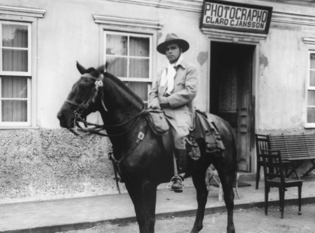 Cena da Revolução de 1930, o deputado Glicério Alves a cavalo na frente do estúdio fotográfico de Claro Jansson.